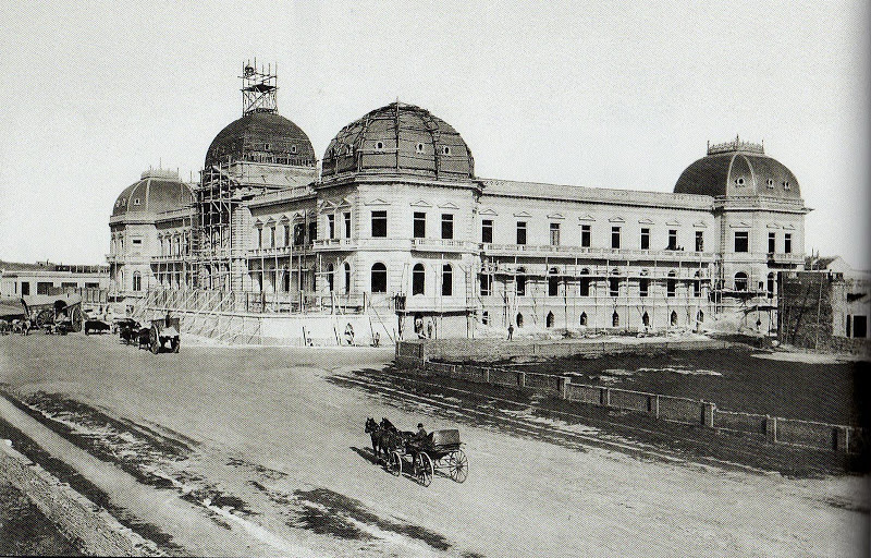 El Palacio de Justicia de La Plata en construcción hacia 1885. Sede de la Suprema Corte de Justicia de la Provincia de Buenos Aires, diseñado por el arquitecto Adolf Buttner en 1883.